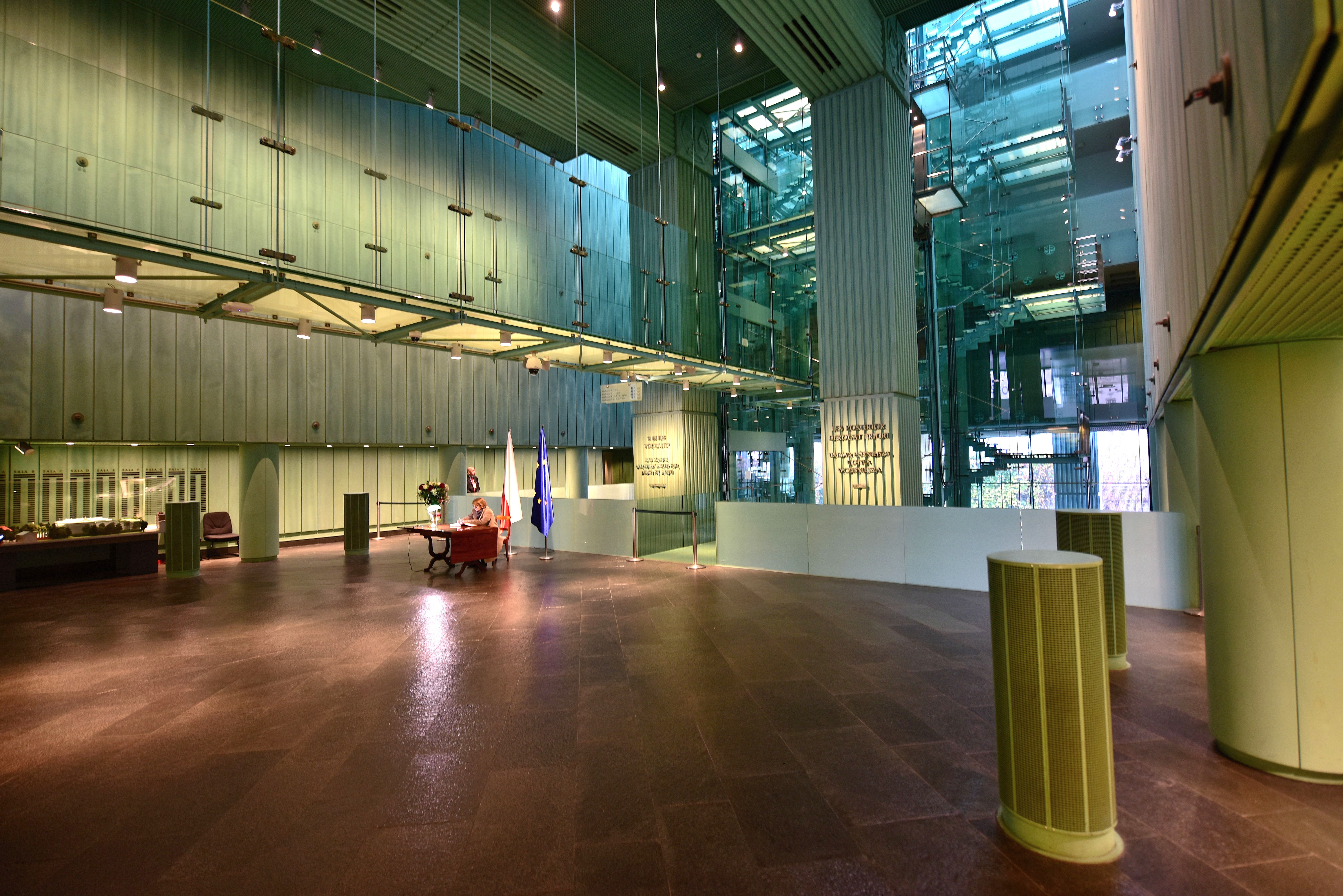 Hol główny w gmachu Sądu Najwyższego w Warszawie